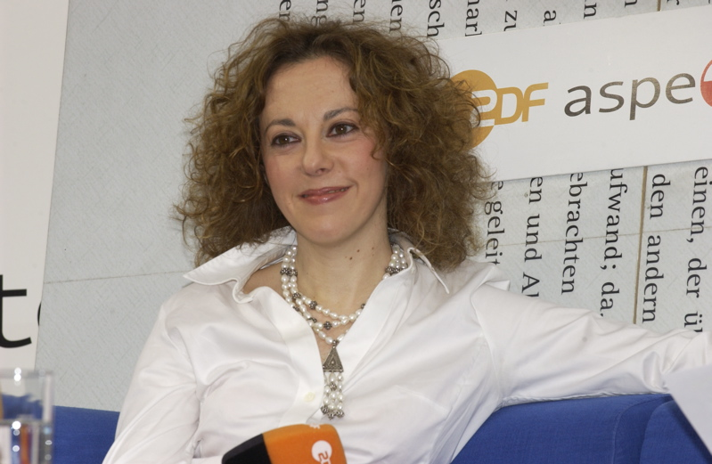 Gila Lustiger bei der Vorstellung ihres Buches So sind wir, auf dem Blauen Sofa während der Leipziger Buchmesse 2005.